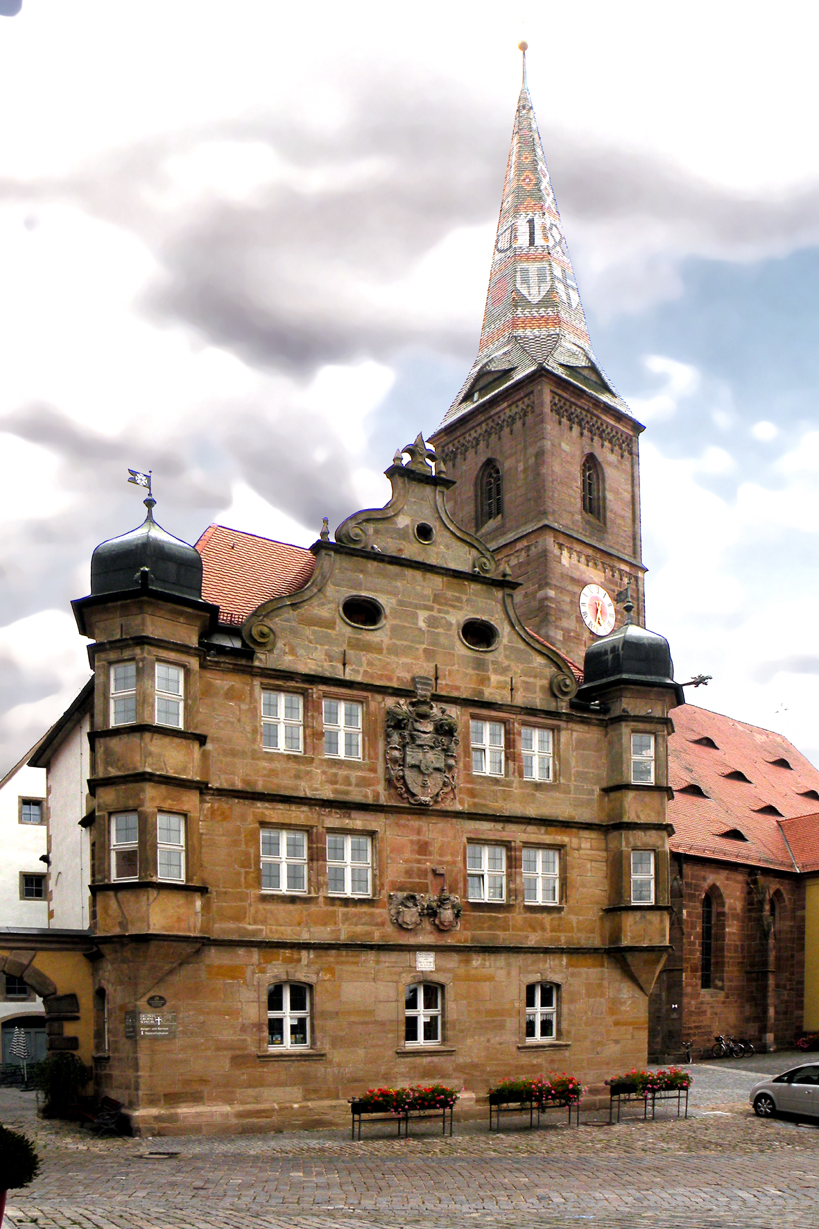 Здание Немецкого ордена и церковь, в которой по легенде похоронен Вольфрам фон Эшенбах